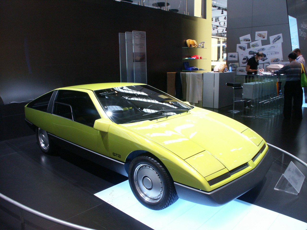 Opel GT2 (1975) at IAA 2003